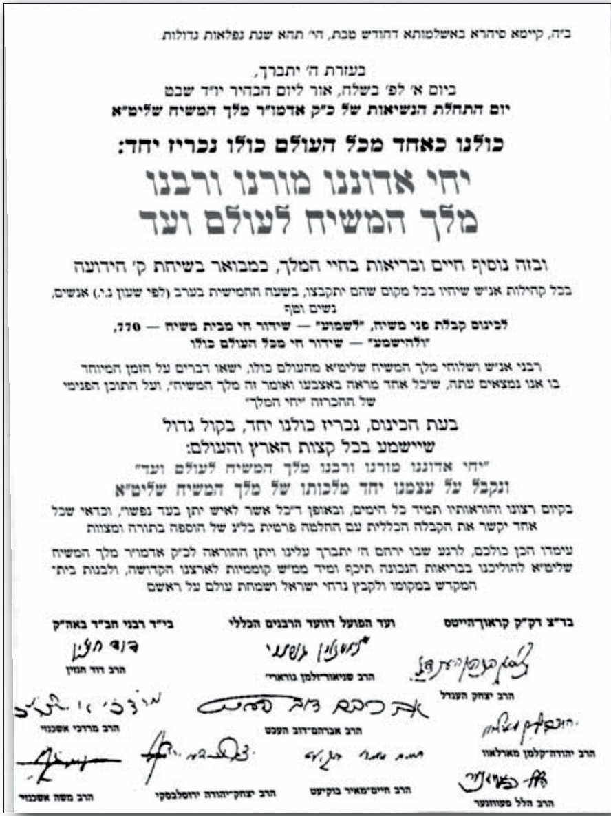 קריאת רבני חב"ד לקראת י' שבת תשנ"ג